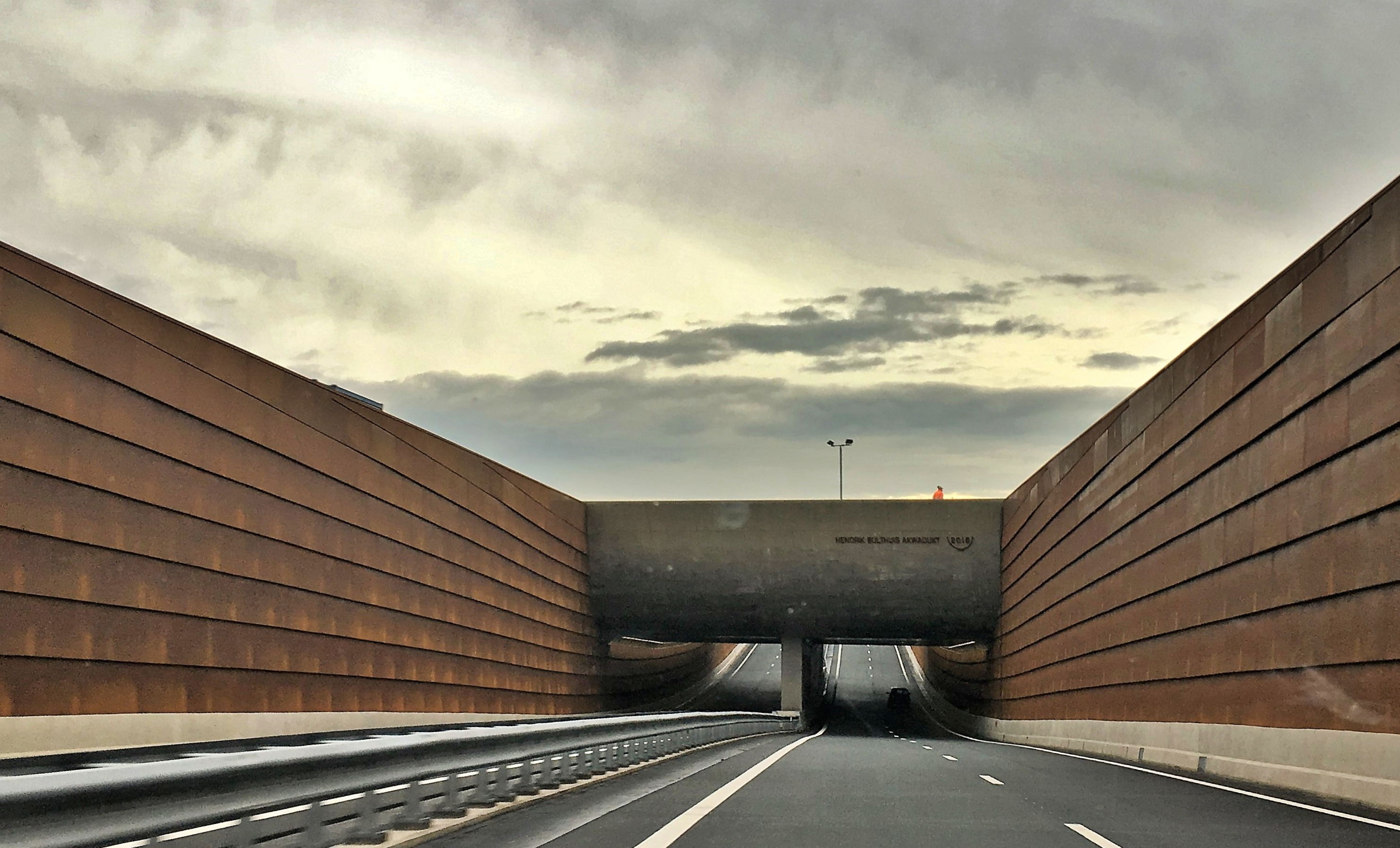 Akwaduct Sintrale As novimber 2016